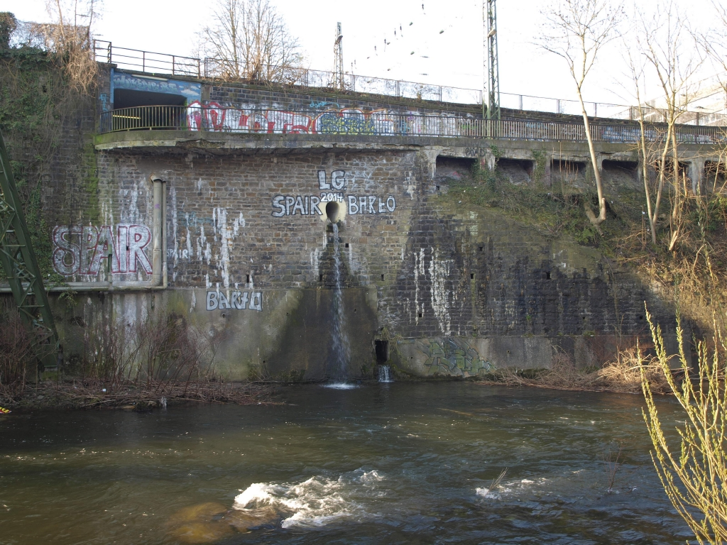 Mündung des Klusesprung, ein Zufluss der Wupper im Wuppertaler Stadtteil Elberfeld.